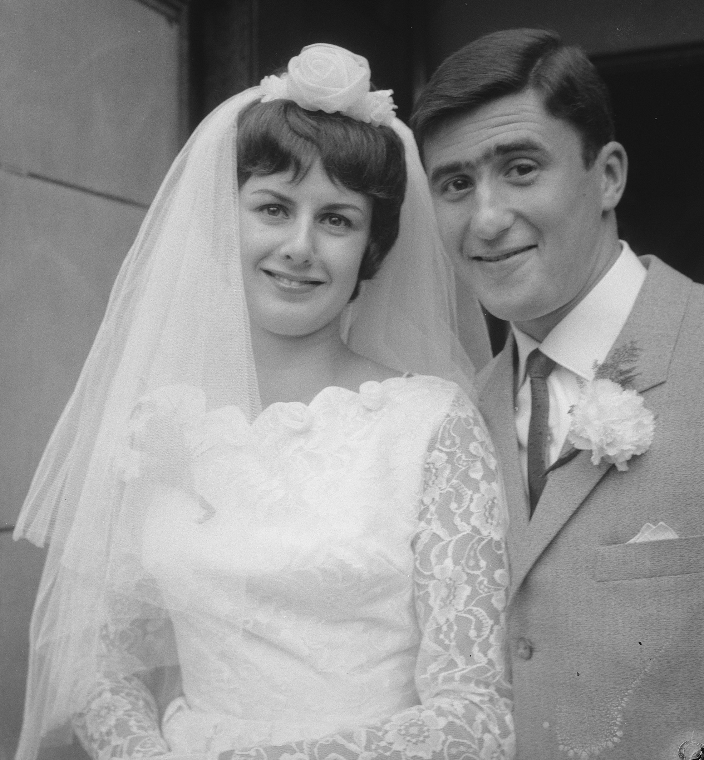 Huwelijk Sjaak Swart en Andrea Sweers.